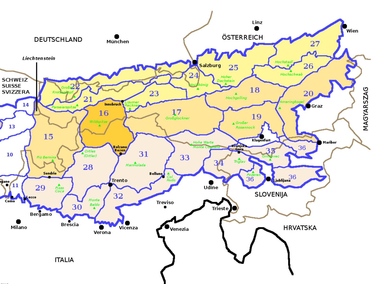 Alpi Orientali secondo la SOIUSA con evidenziate le Alpi Retiche Orientali